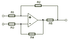 Stroombron opgebouwd met een opamp